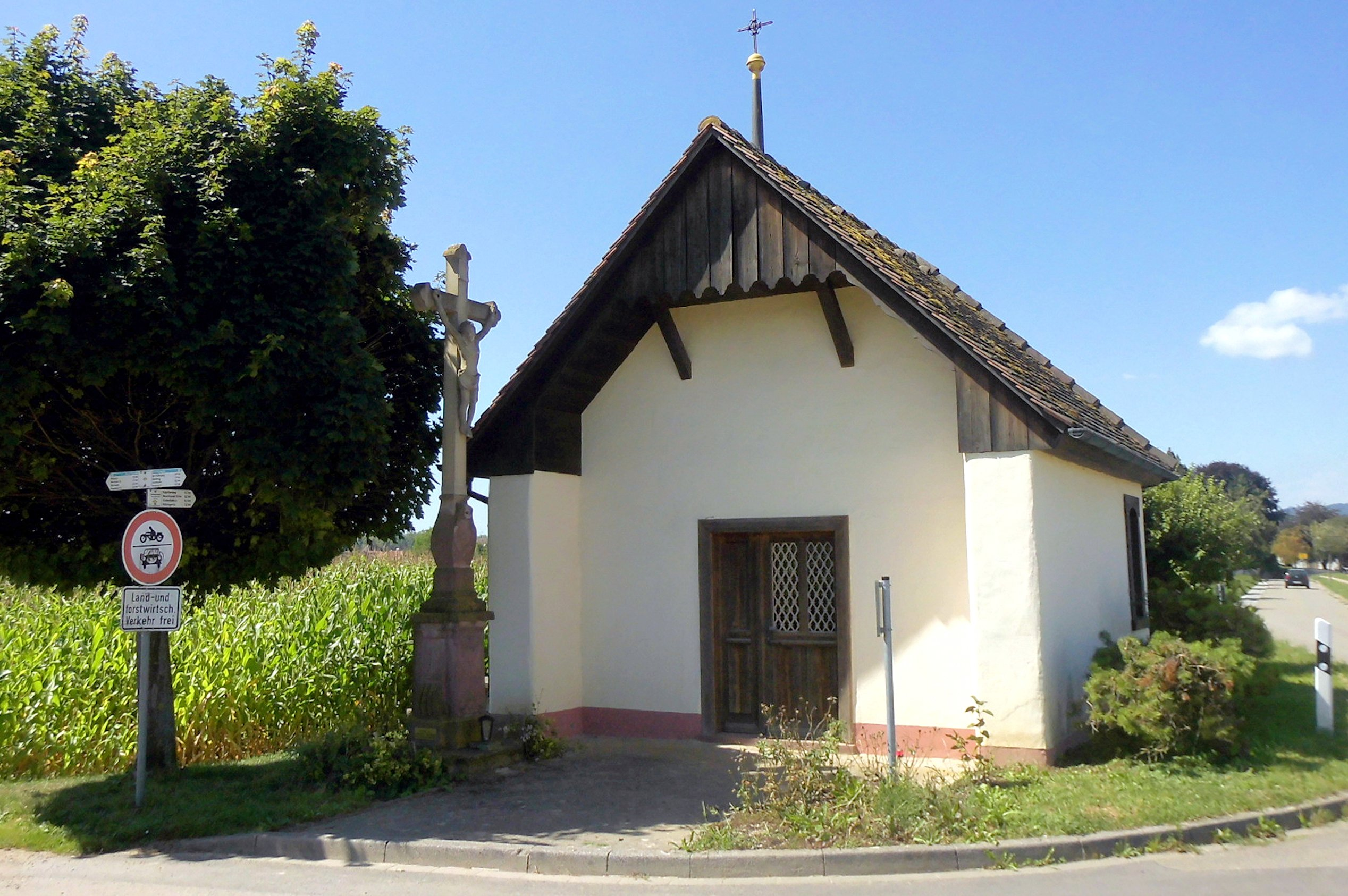 Dreifaltigkeitskapelle in Neuershausen, Gemeinde March, Baden